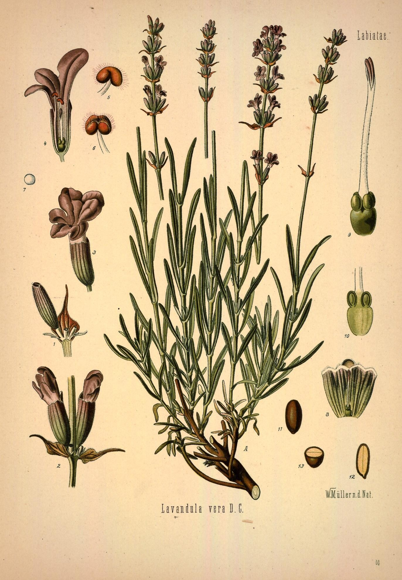 Lavendel. A blühende Pflanze, natürl. Grösse; 1 Zweigstück mit Kelch und Deckblatt, vergrössert; 2 Zweigstück mit 2 Blüthen, desgl.; 3 Blüthe, desgl.; 4 dieselbe im Längsschnitt, desgl.; 5 Staubgefäss, desgl.; 6 dasselbe, geöffnet, desgl.; 7 Pollen, desgl.; 8 Stempel mit aufgeschnittenem Kelche, desgl.; 9 Stempel, stärker vergrössert; 10 unterer Theil des Stempels mit Scheibe, zerschnitten, desgl.; 11 Same, desgl.; 12, 13 derselbe im Quer- und Längschnitt desgl.